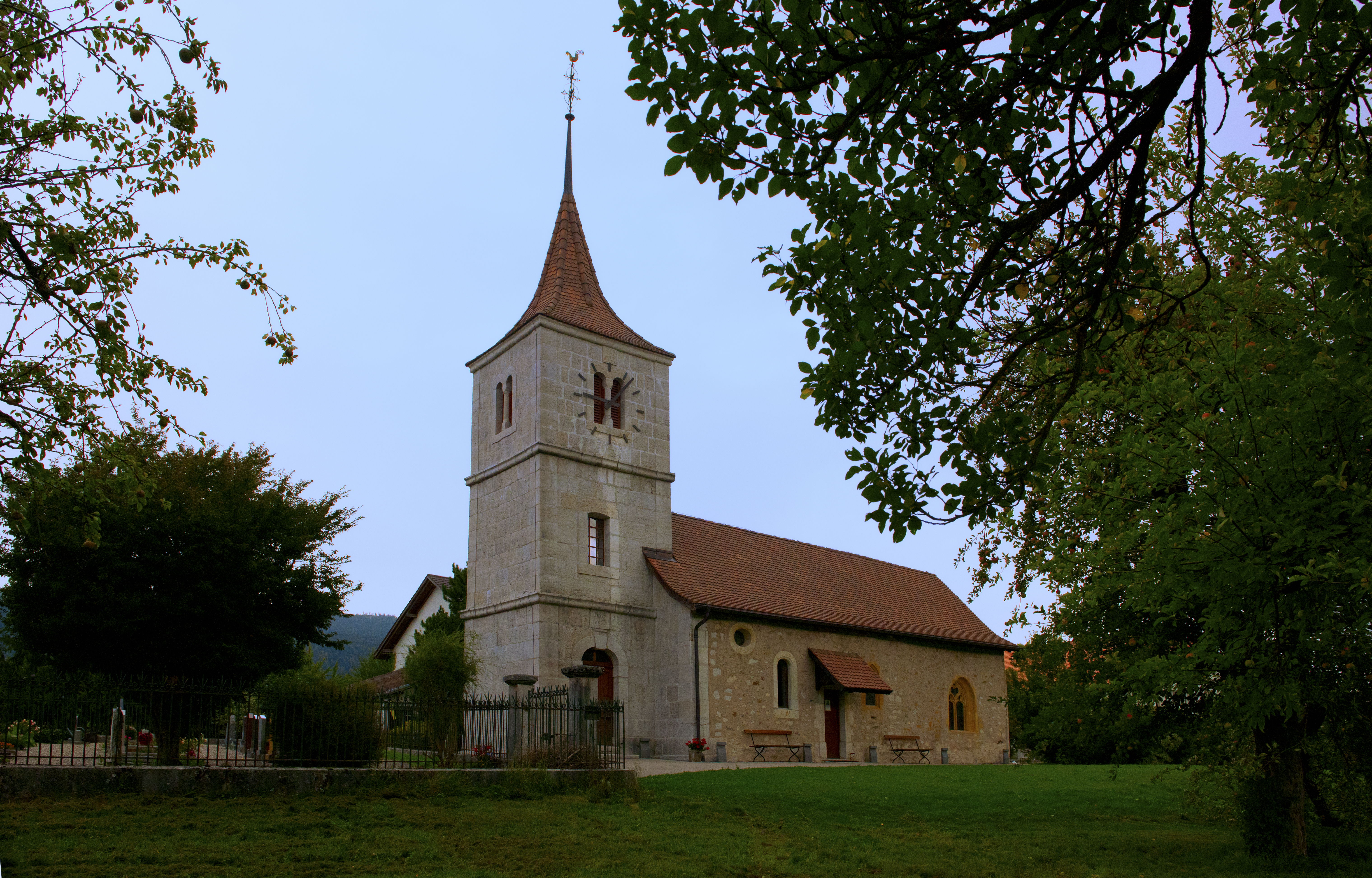 Engollon, Église d'Engollon